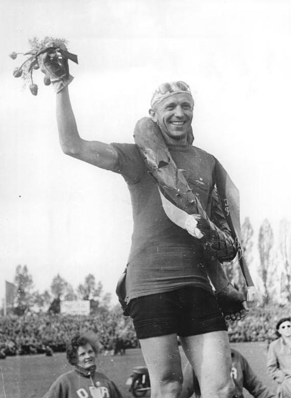 VIII. Friedensfahrt, Jan Vesely Zentralbild Kronfeld 13.5.1955 VIII. Internationale Friedensfahrt Prag-Berlin-Warschau 1955 - 9. Etappe von Berlin nach Cottbus über 126 km. UBz: Der tschechoslowakische Mannschaftskapitän Jan Vesely errang in Cottbus seit Bestehen der Friedensfahrt den 15. Etappensieg. Vesely auf dem Siegespodest.